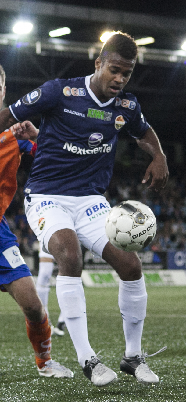 Kamara